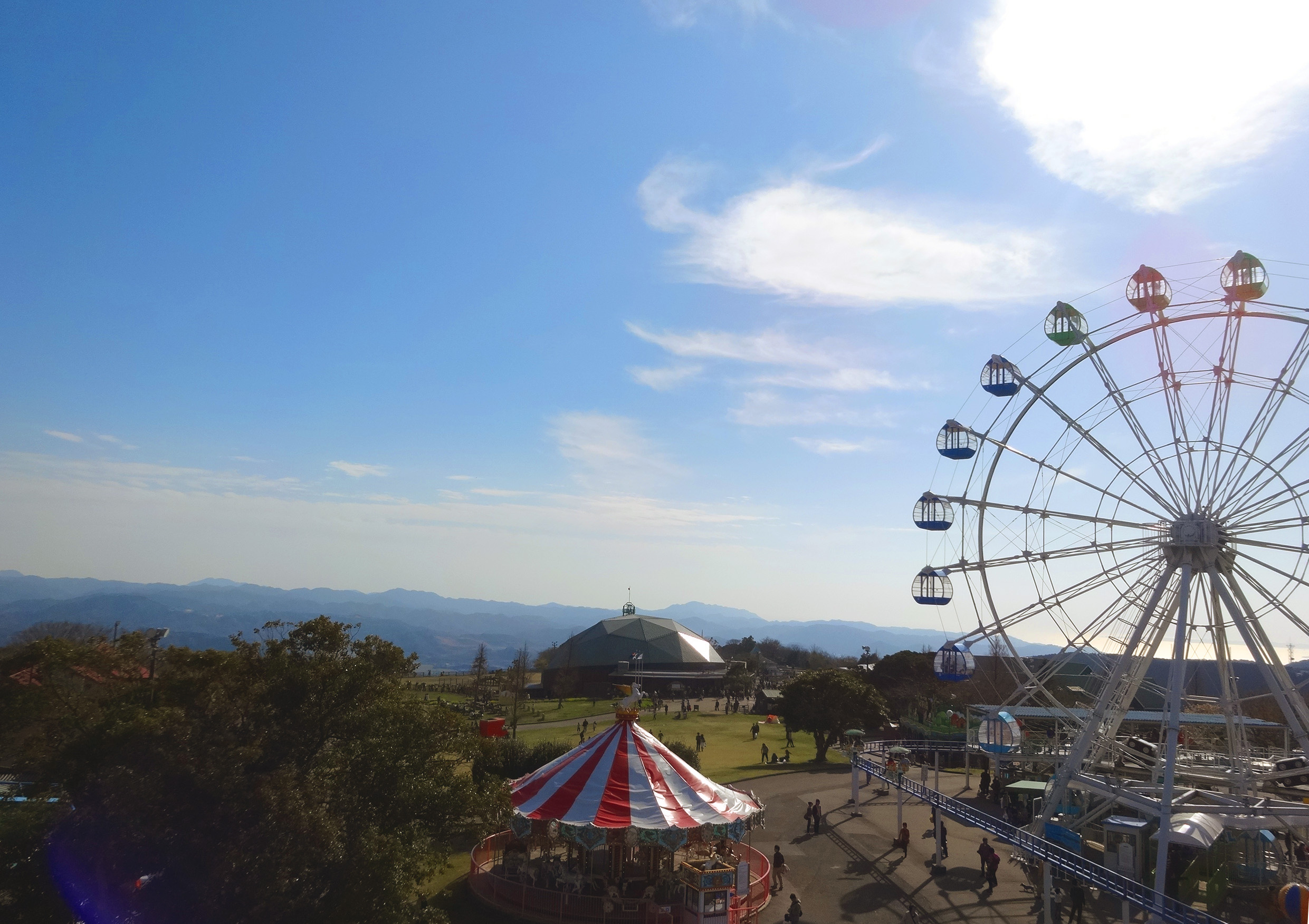 展望台からの景色（2015年撮影）